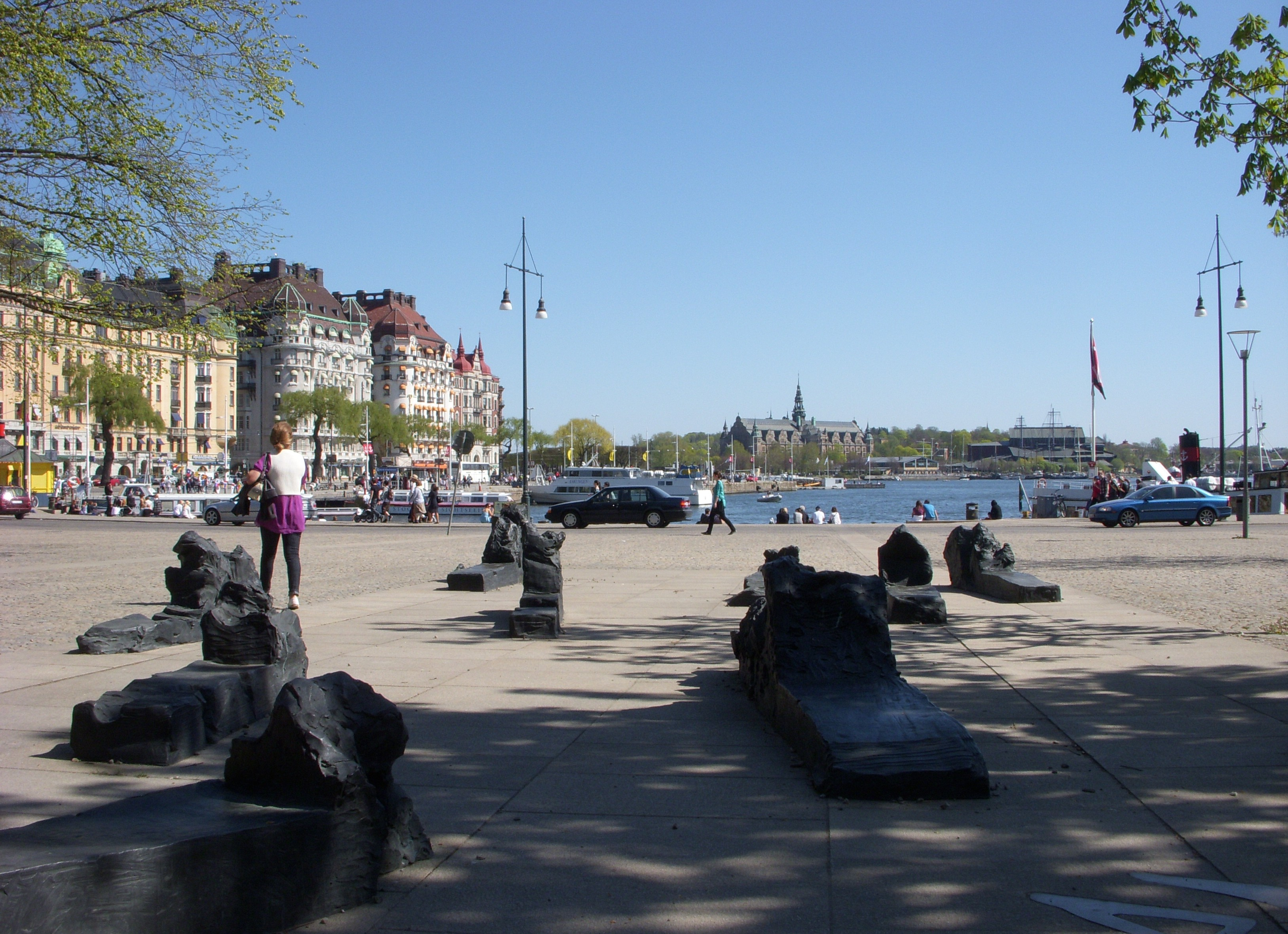 Raoul Wallenbergs torg i Stockholm, vy mot Nybroviken. Skulpturen Till Raoul Wallenberg av Kirsten Ortwed